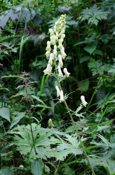 Aconitum vulparia